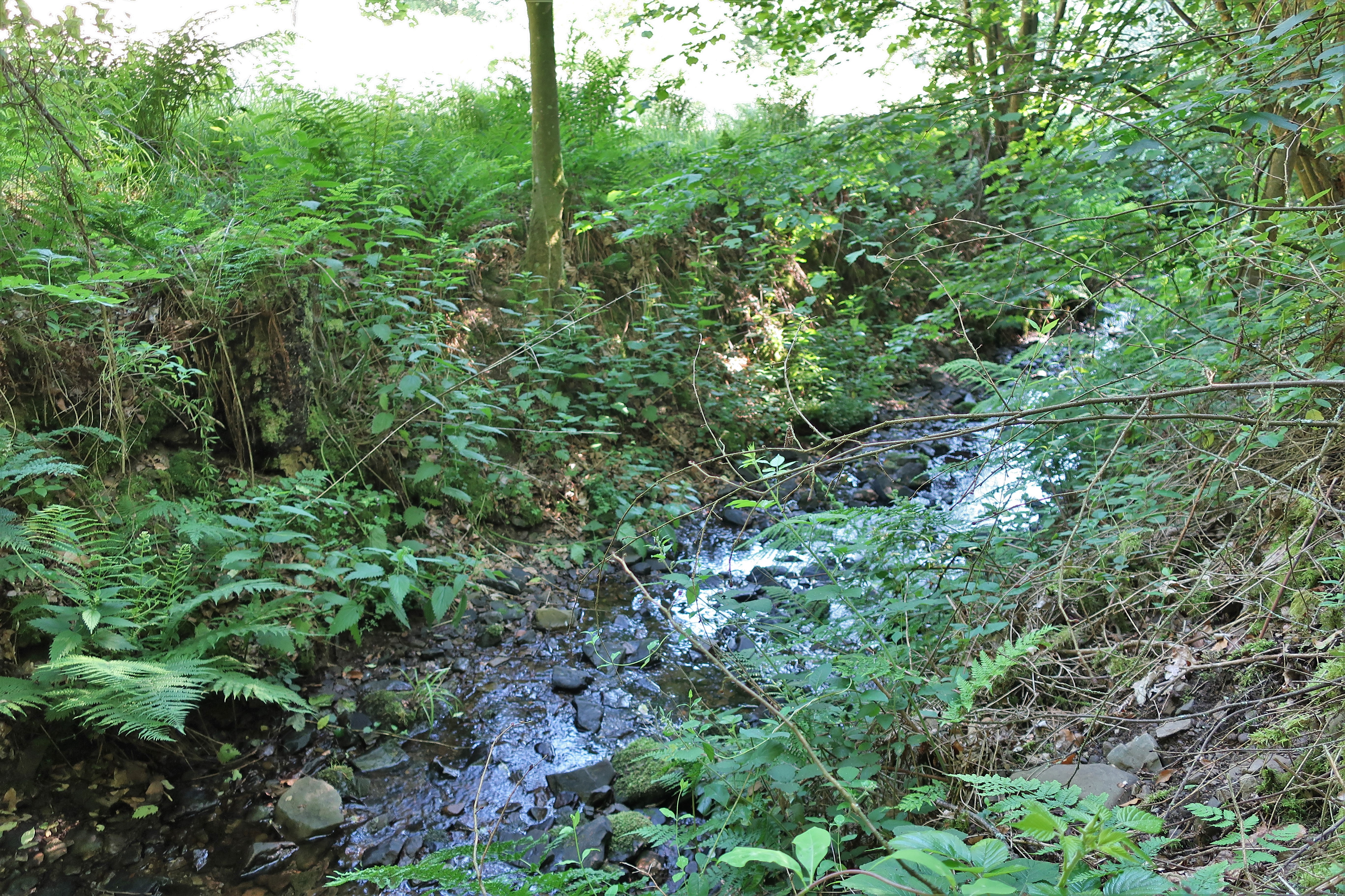 Oberlauf des Selbecker Baches in Hagen neben der Höhwaldstraße.